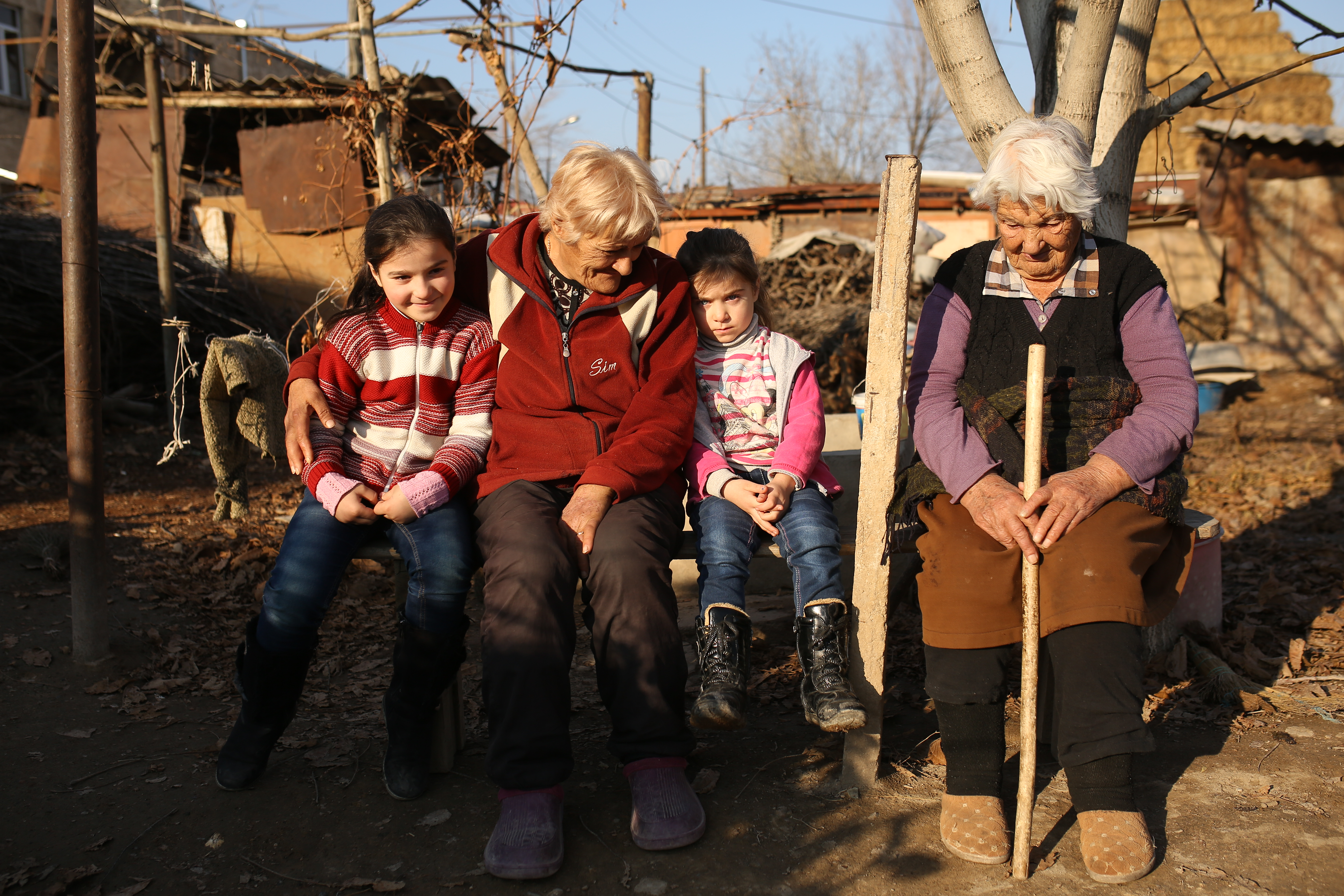 Երեխաներն ու մեծահասակները մասնակցում են իրենց գյուղական համայնքի զարգացմանը